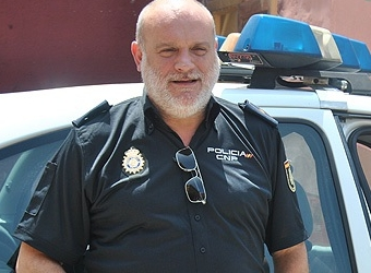 Juanma Lara actuando como policía